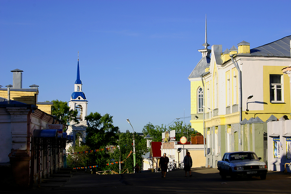 Kineshma, Seitenstraße in der Stadtmitte